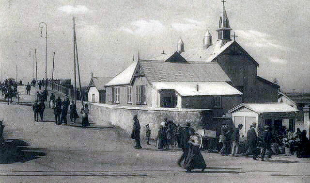 La chiesa della candelora nel perioodo dei baraccamenti dopo il terremoto del 1908.